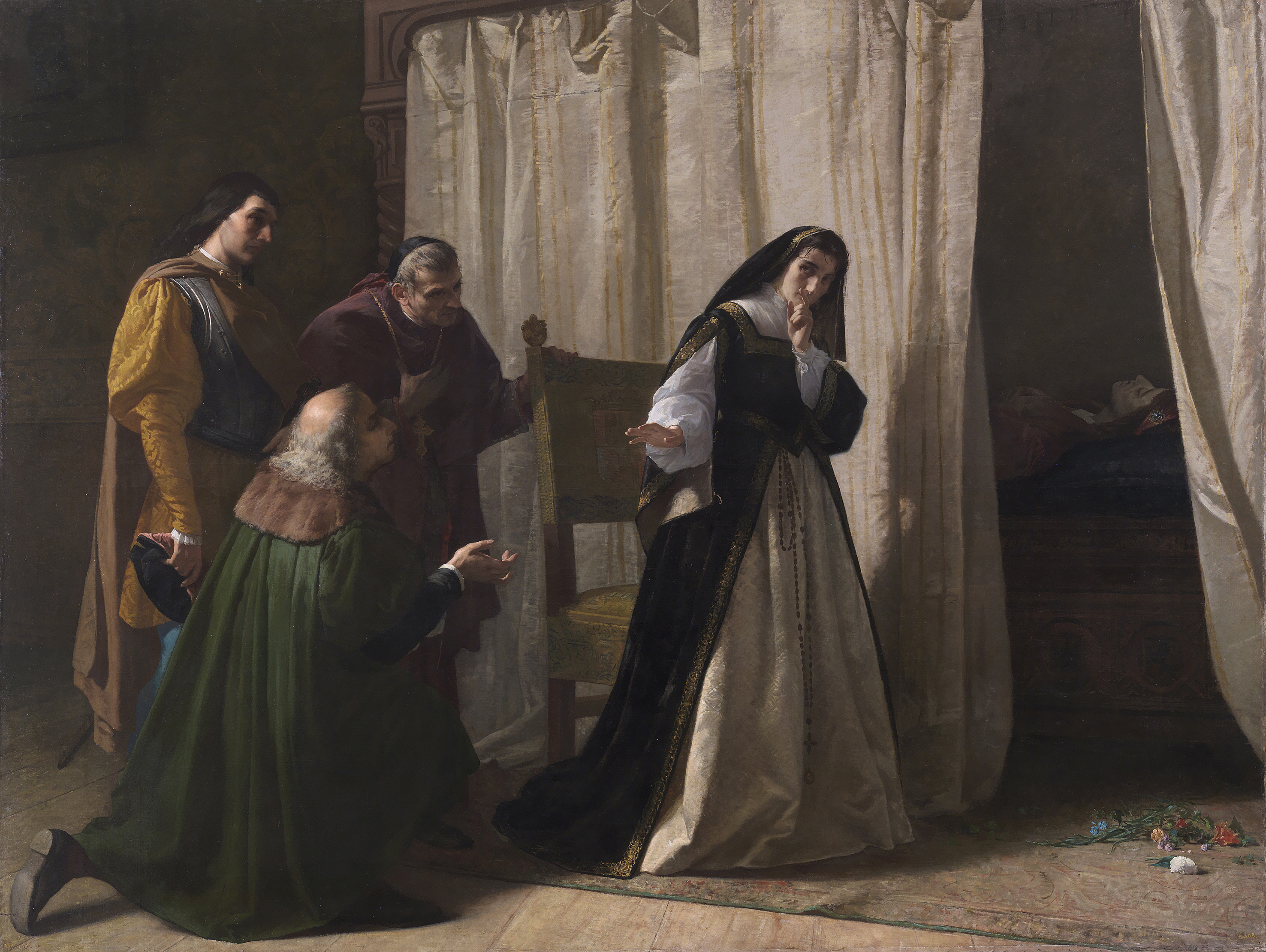 La obra representa a la enajenada reina Juana I de Castilla (1479-1555) junto al cadáver de su esposo.